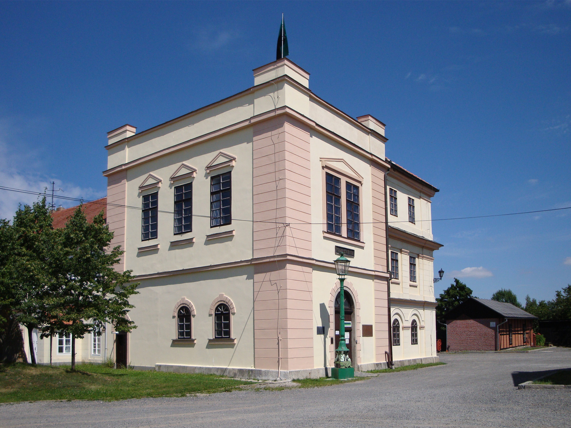 Důl Marie na Březových Horách v Příbrami